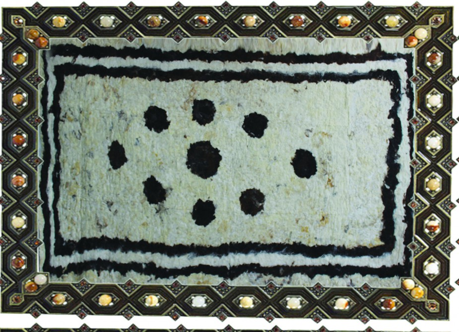 Keçəçilik